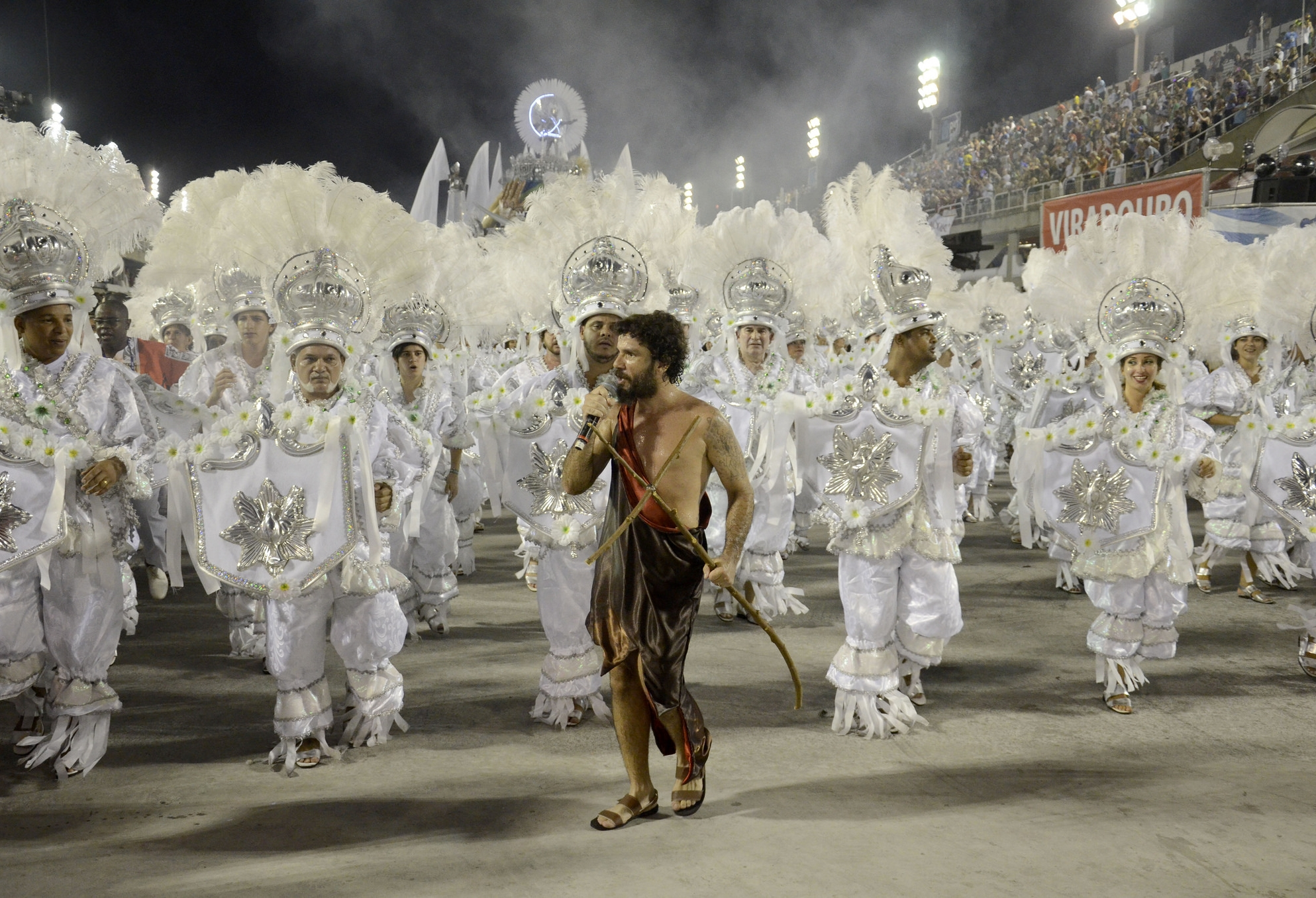 Rio de Janeiro - Unidos do Viradouro se apresenta na Marquês de Sapucaí, pela Série A do carnaval carioca (Alexandre Macieira/Agência Brasil)